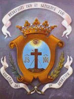 Emblema de les Oblates del Santíssim Sagrament, d'una estampa devocional de ca. 1920